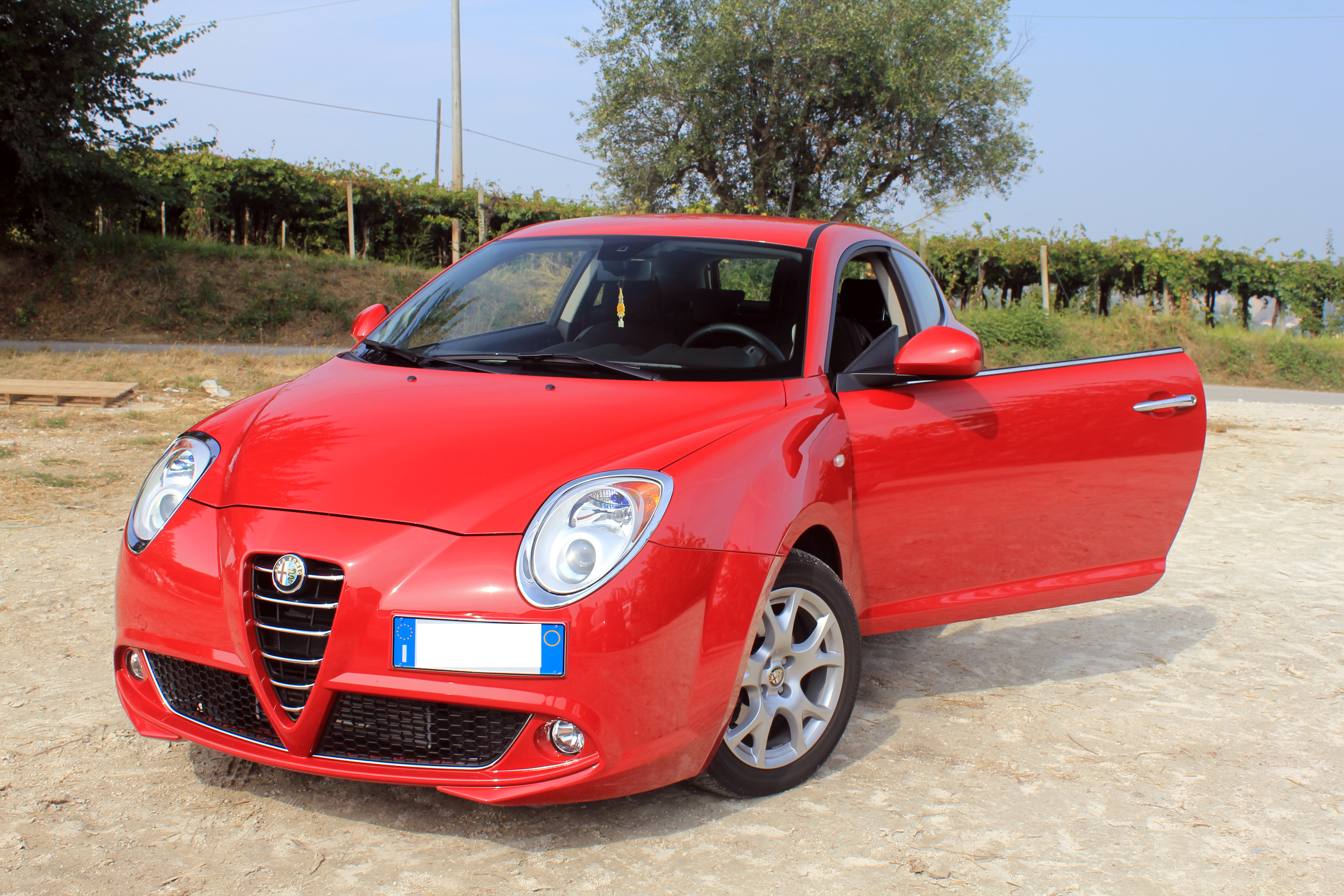 alfa romeo mito 2011